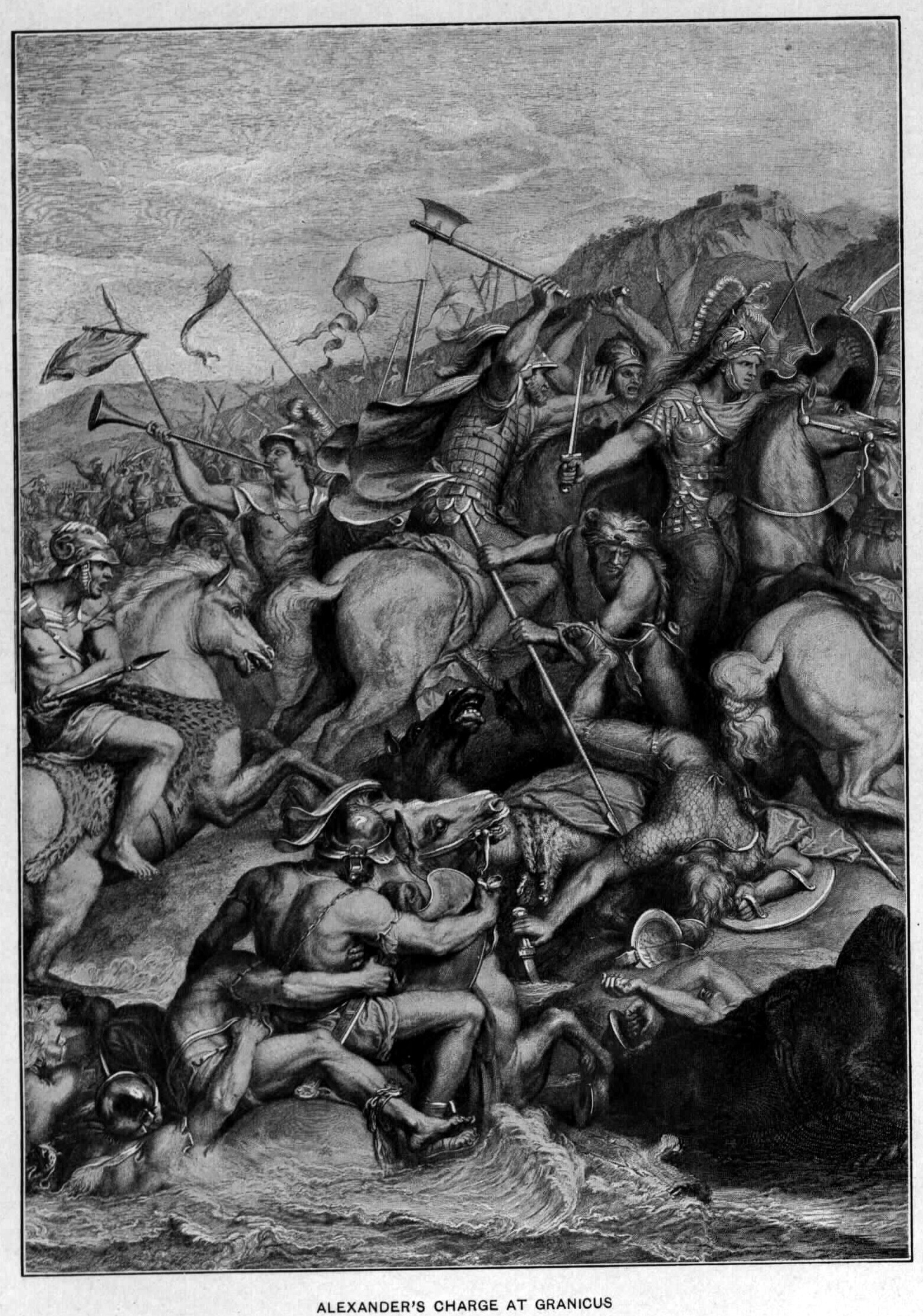 Alexander old drawings